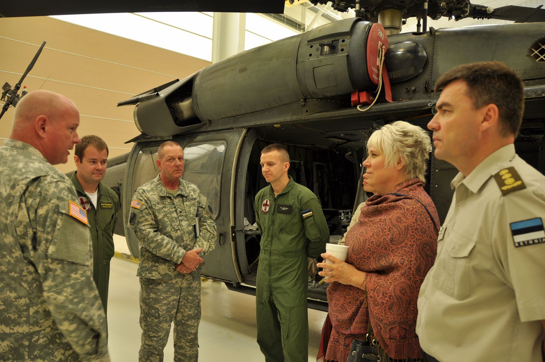 Eesti suursaadik Marina Kaljurand kohtus USA-s õppivate Eesti õhuväe kopteripilootidega